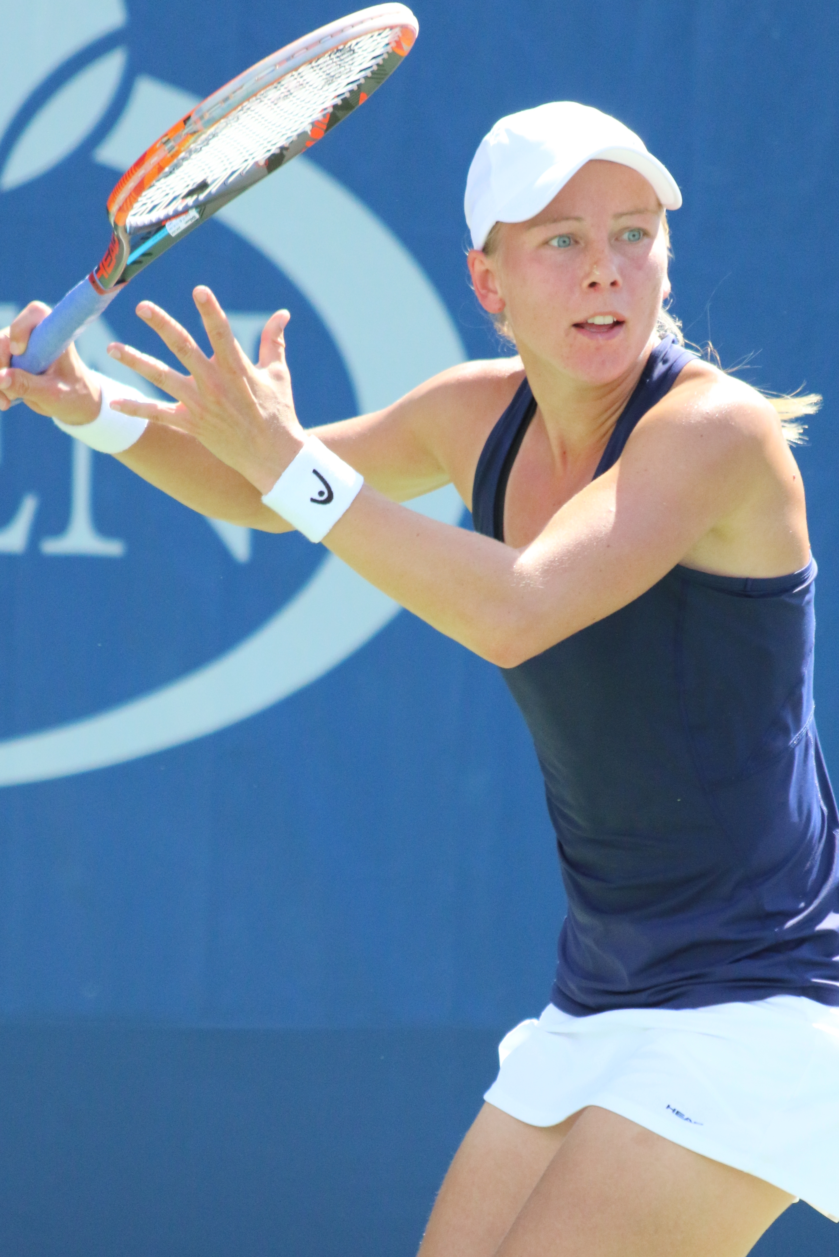 Larsson US16 (21)